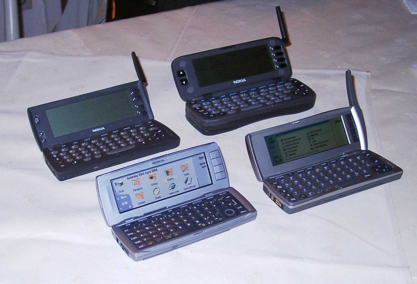 Beschreibung: Einige Nokia Communictor Modelle, von hinten nach vorne 9000, 9110, 9210, 9500 Quelle: fotografiert vom Uploader 3.4.2004 Lizenzstatus: GNU FDL